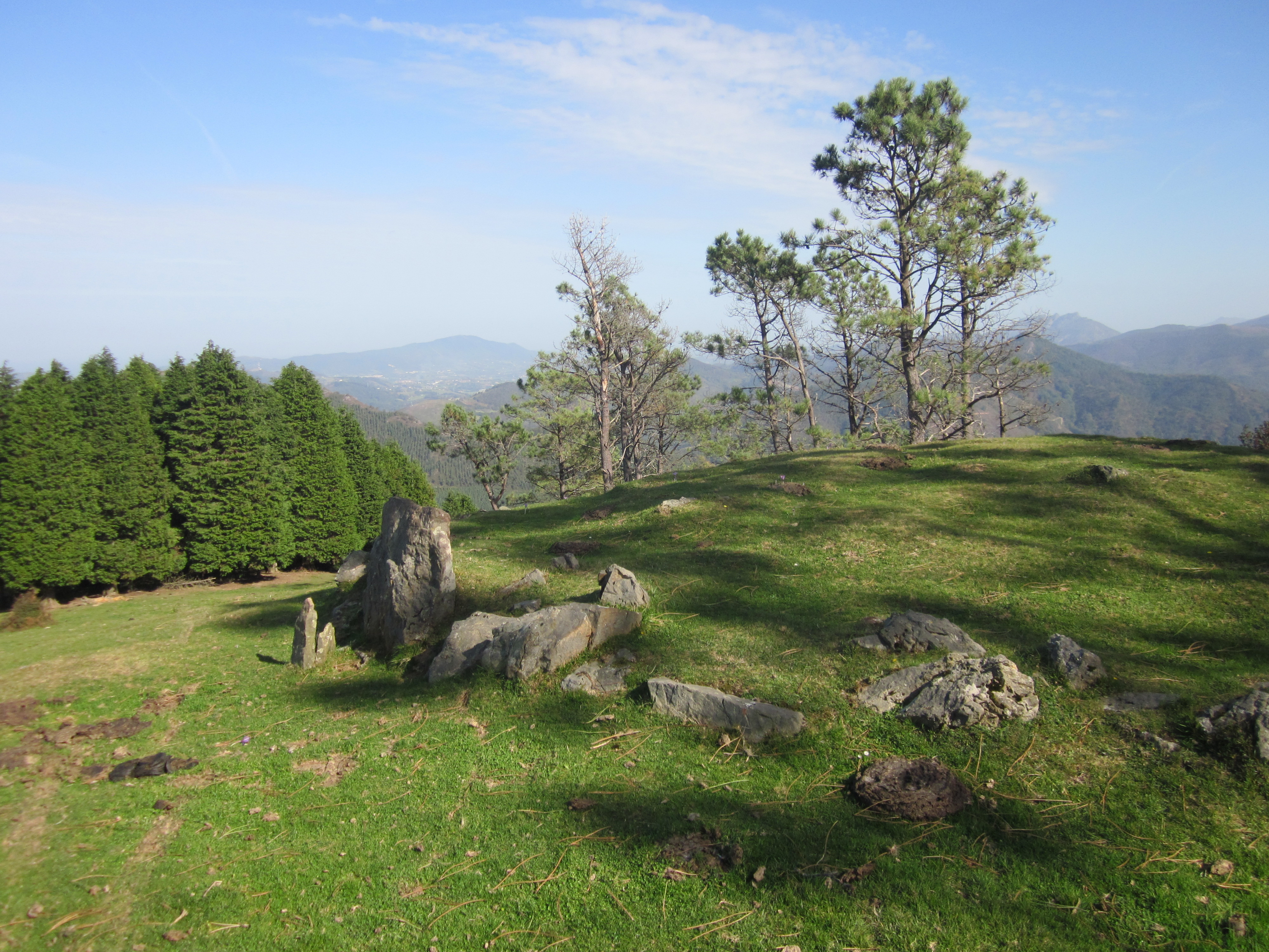 paysage depuis Elurzulo